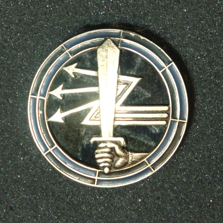 This photograph is in the public domain because according to the Art. 3 of copyright law of March 29, 1926 of the Republic of Poland and Art. 2 of copyright law of July 10, 1952 of the People's Republic of Poland, all photographs by Polish photographers (or published for the first time in Poland or simultaneously in Poland and abroad) published without a clear copyright notice before the law was changed on May 23, 1994 are assumed to be in the public domain in Poland. This work is in the public domain in the United States because it meets three requirements: it was first published outside the United States (and not published in the U.S. within 30 days), it was first published before 1 March 1989 without copyright notice or before 1964 without copyright renewal or before the source country established copyright relations with the United States, it was in the public domain in its home country (Poland) on the URAA date (1 January 1996). To uploader: Please provide where and when the image was first published.